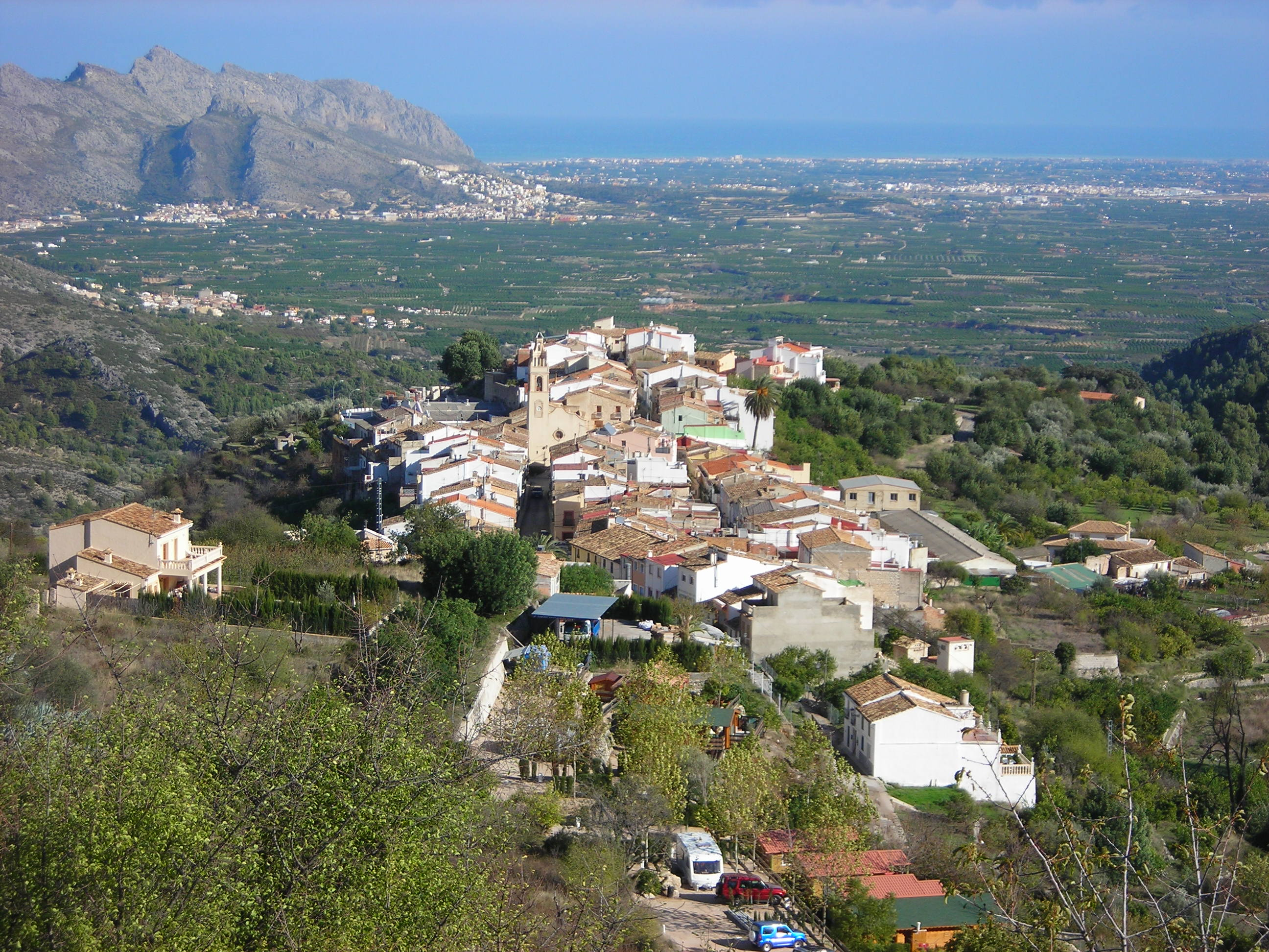 Vista del núcleo de Campell desde Fleix